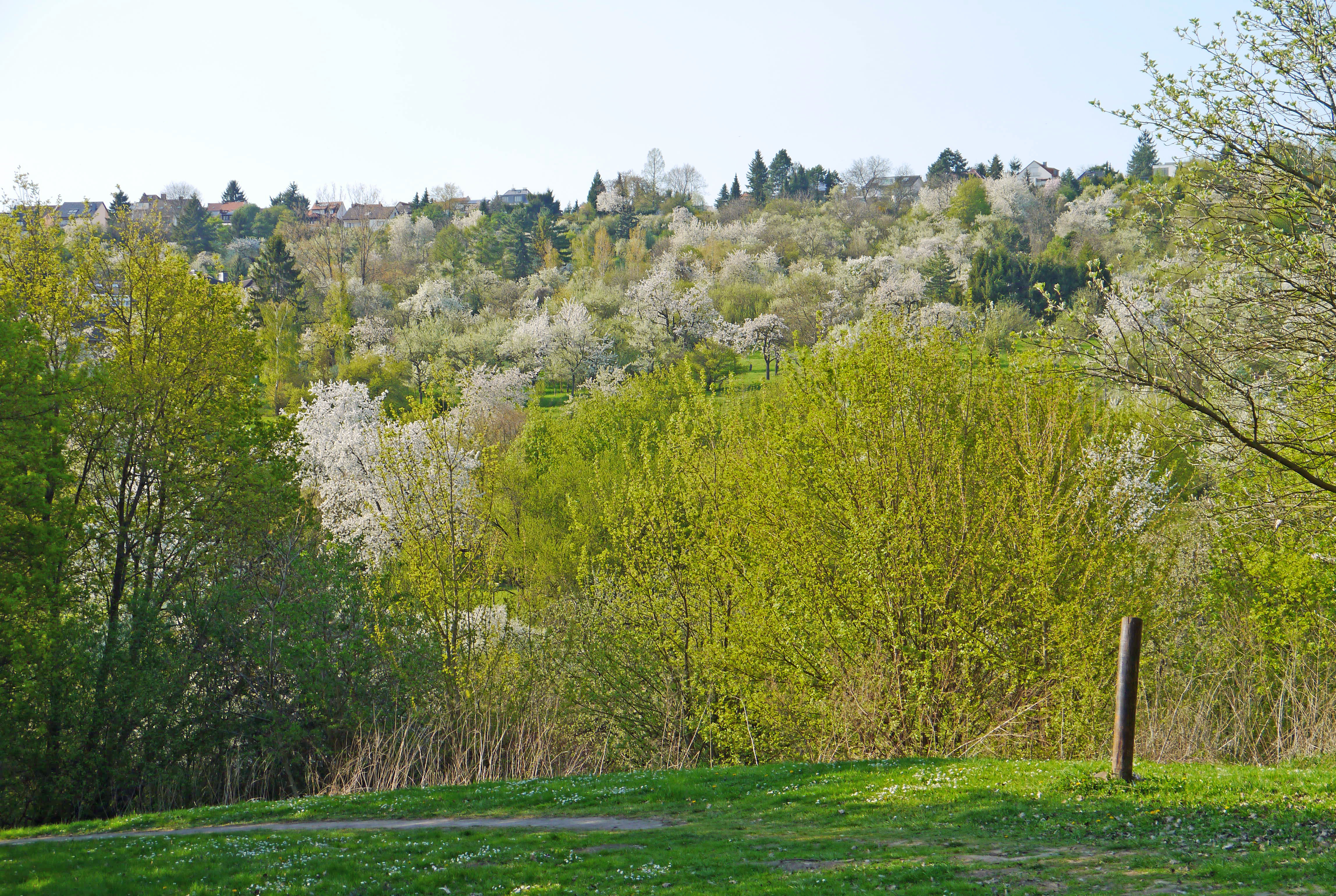 Blühende Bäume und Hecken, 2013 am Berger Hang, in Frankfurt-Bergen-Enkheim.